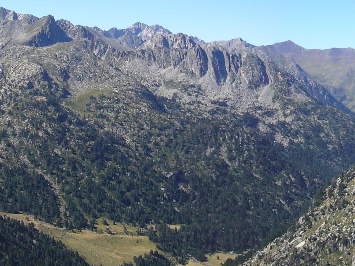 Vall de les Corticelles, vista des de Colomers d'Espot; la Vall de Boí, Alta Ribagorça, Catalunya